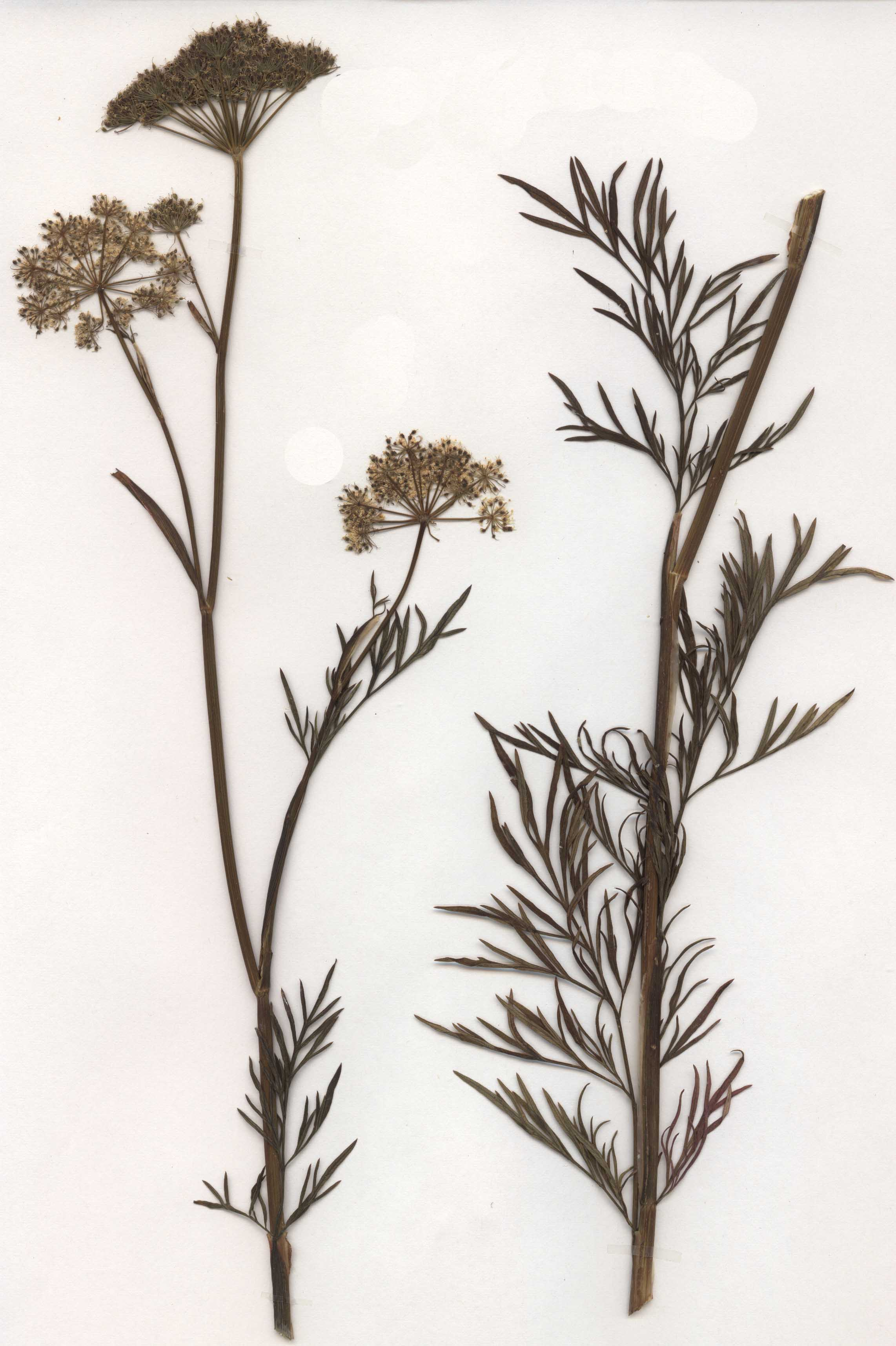 eigener Herbarbeleg von 1985, Unterfranken